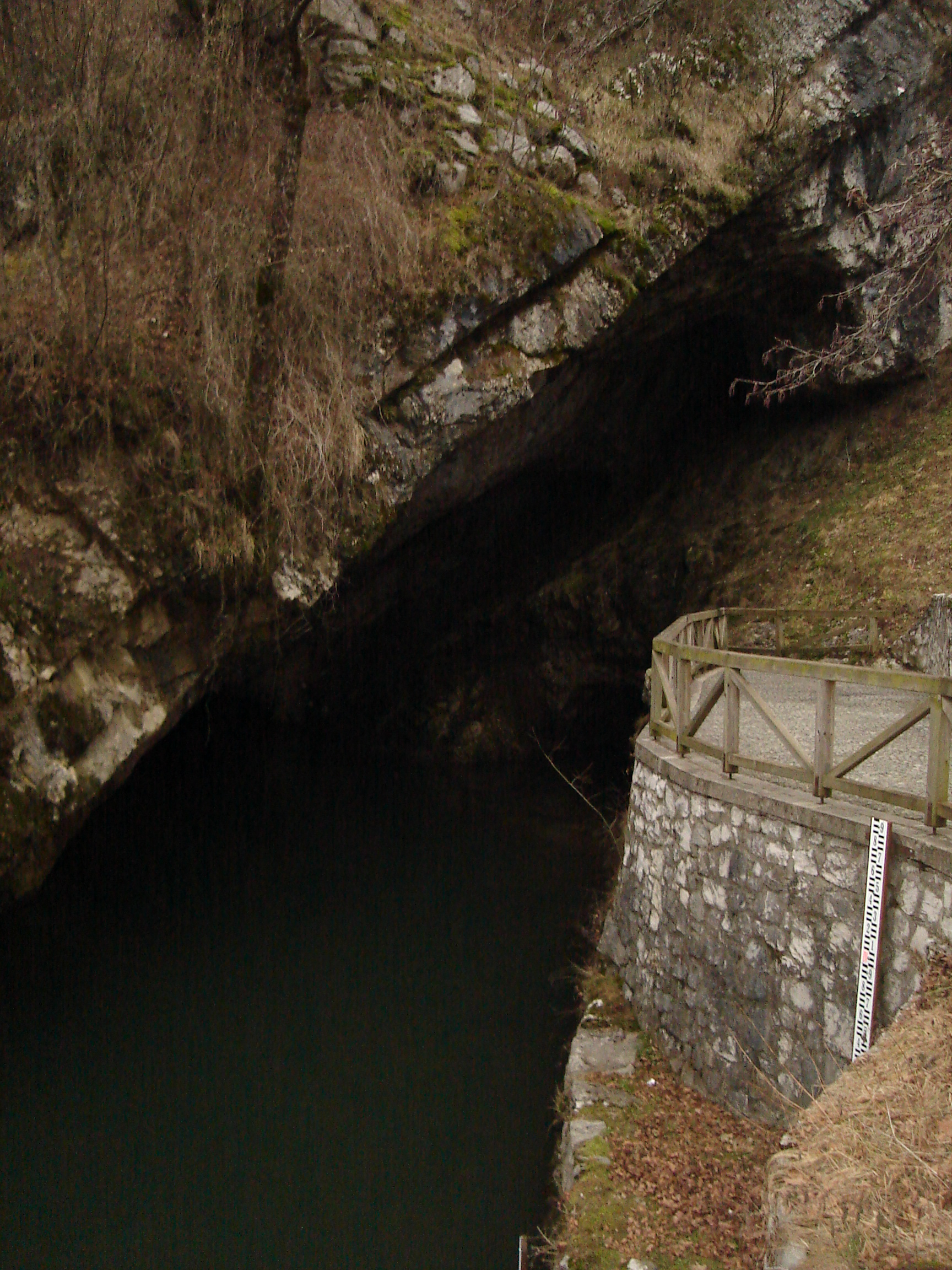 Postojnska jama